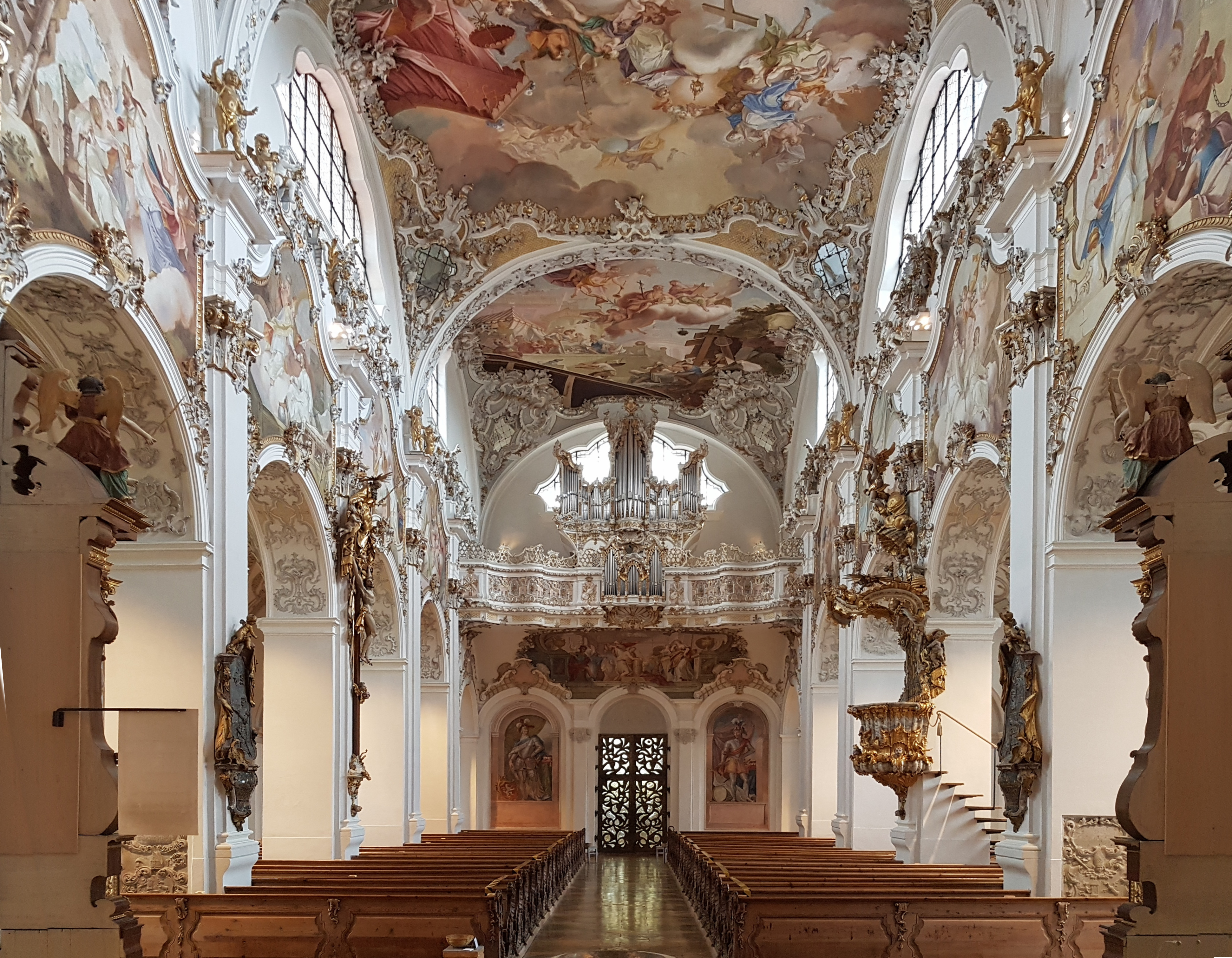 Stiftskirche St. Johannes d. T. (Steingaden)